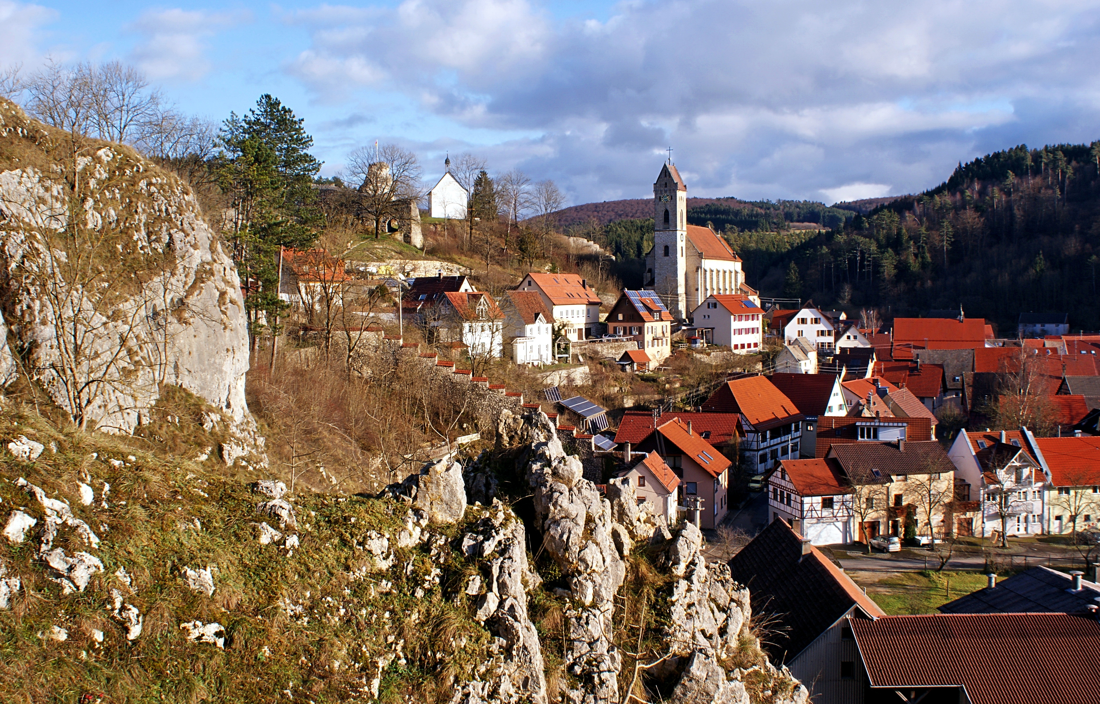 Veringenstadt Stadt, Kirche St. Nikolaus, Burgrunine mit Peterskapelle. (Blick aus Westen)